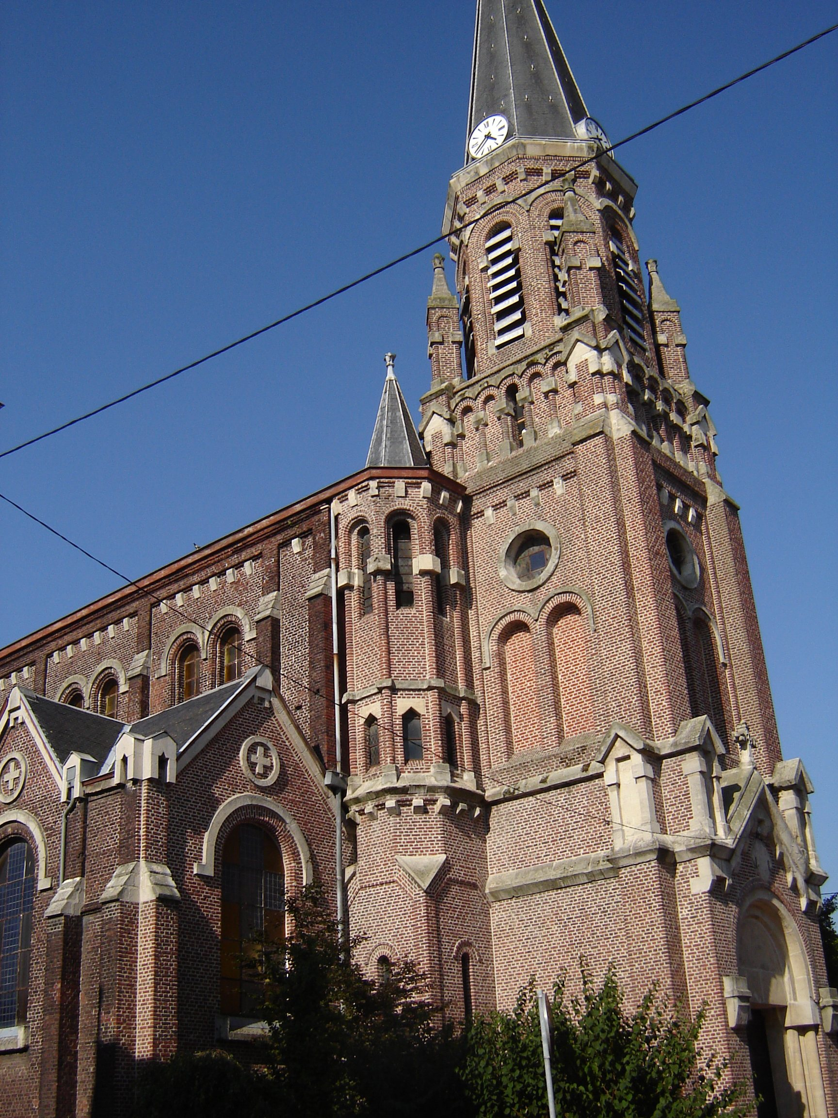 Eglise de l' Immaculée-Conception. Wervicq-Sud, Nord, Nord-Pas-de-Calais, France.